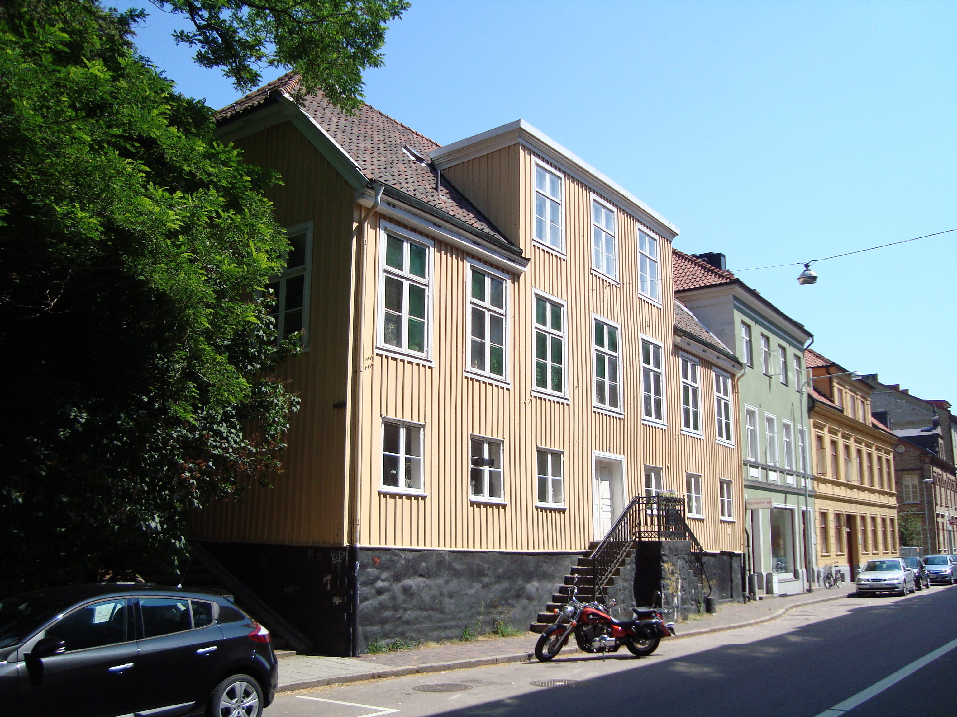 Tornérhjelmska huset i Helsingborg.